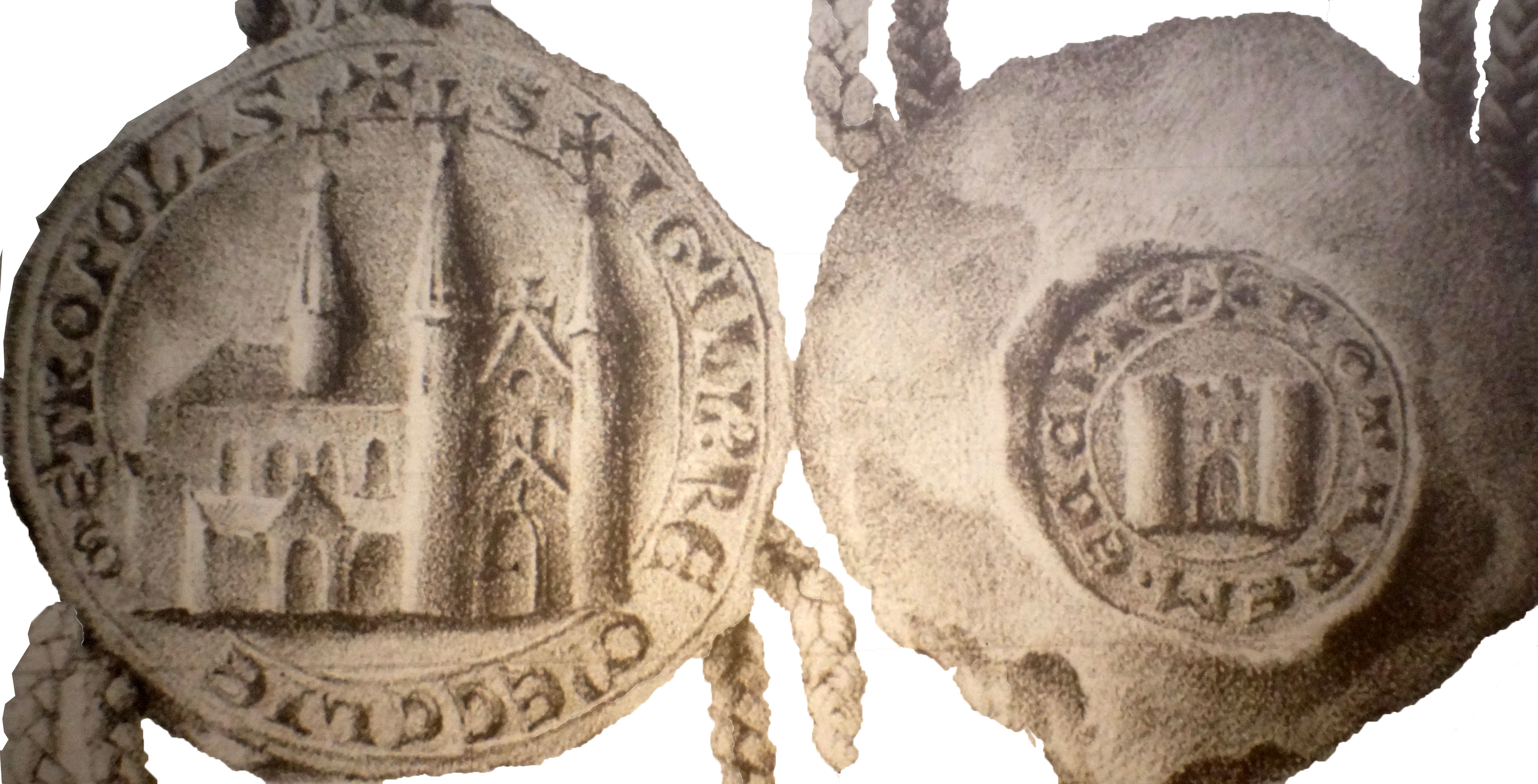 cf le titre.